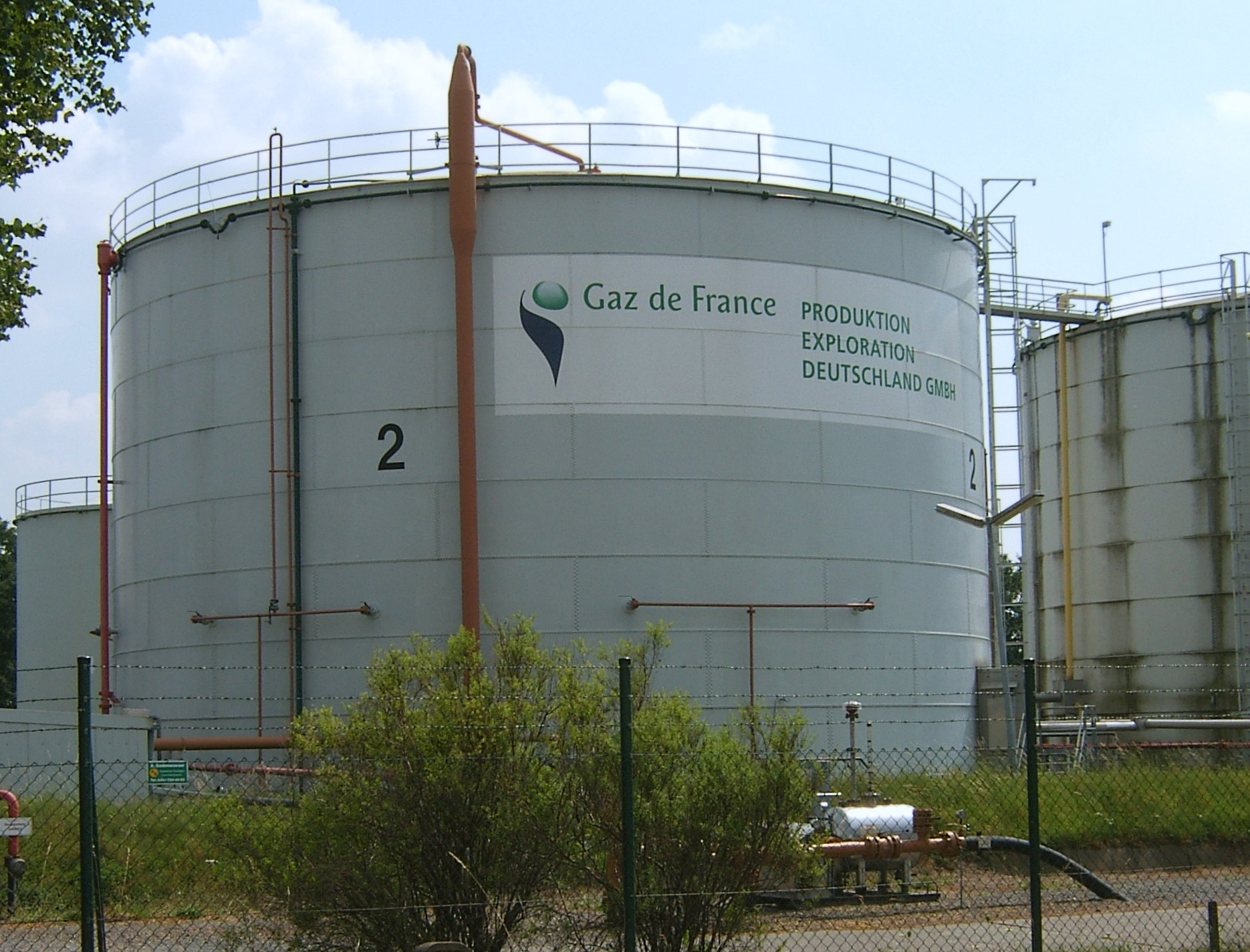 Hamburg, Altengamme, Erdgasspeicher